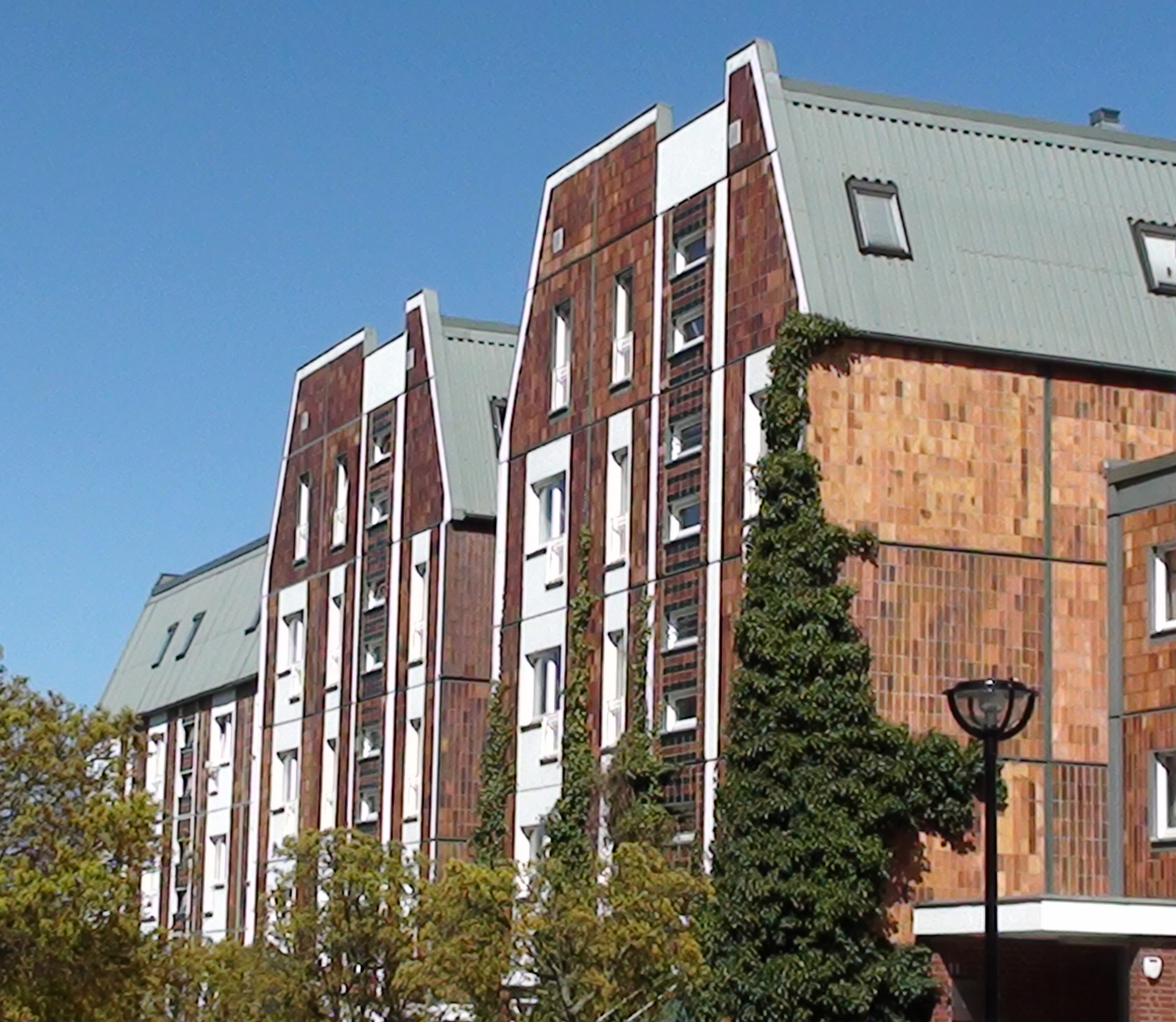 an den Baustil der Hansezeit angelehnte Plattenbauten